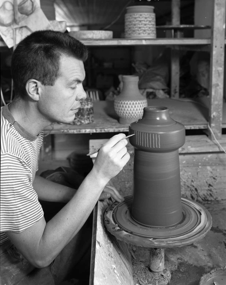 Erik Pløen (født 10. februar 1925 - død 2004) var en norsk keramiker fra Gran på Hadeland.